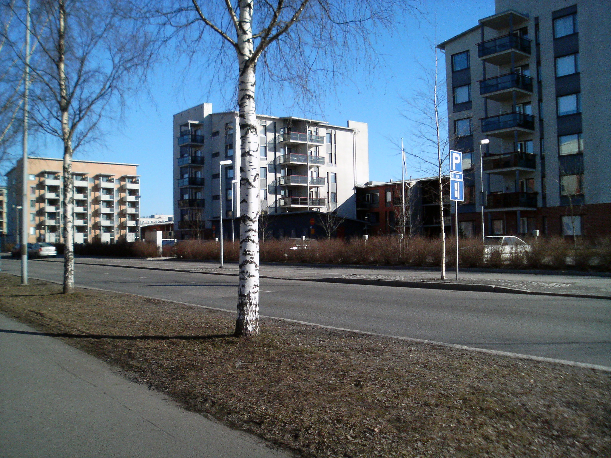 Hervanta_1.jpg